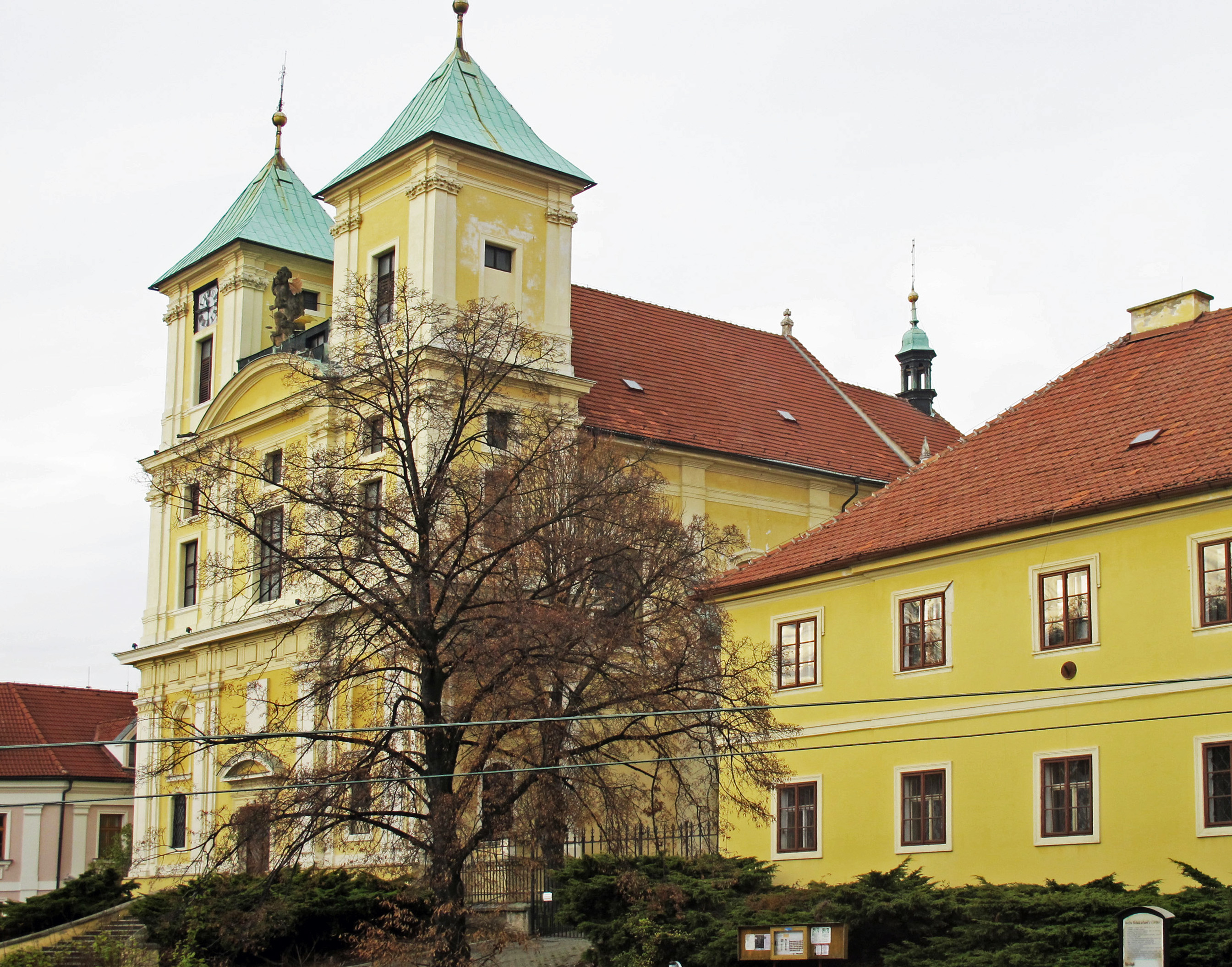 Kostel sv. Michaela archanděla, Masarykovo náměstí, Litvínov, vpravo fara